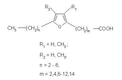 Жирные карбоновые кислоты